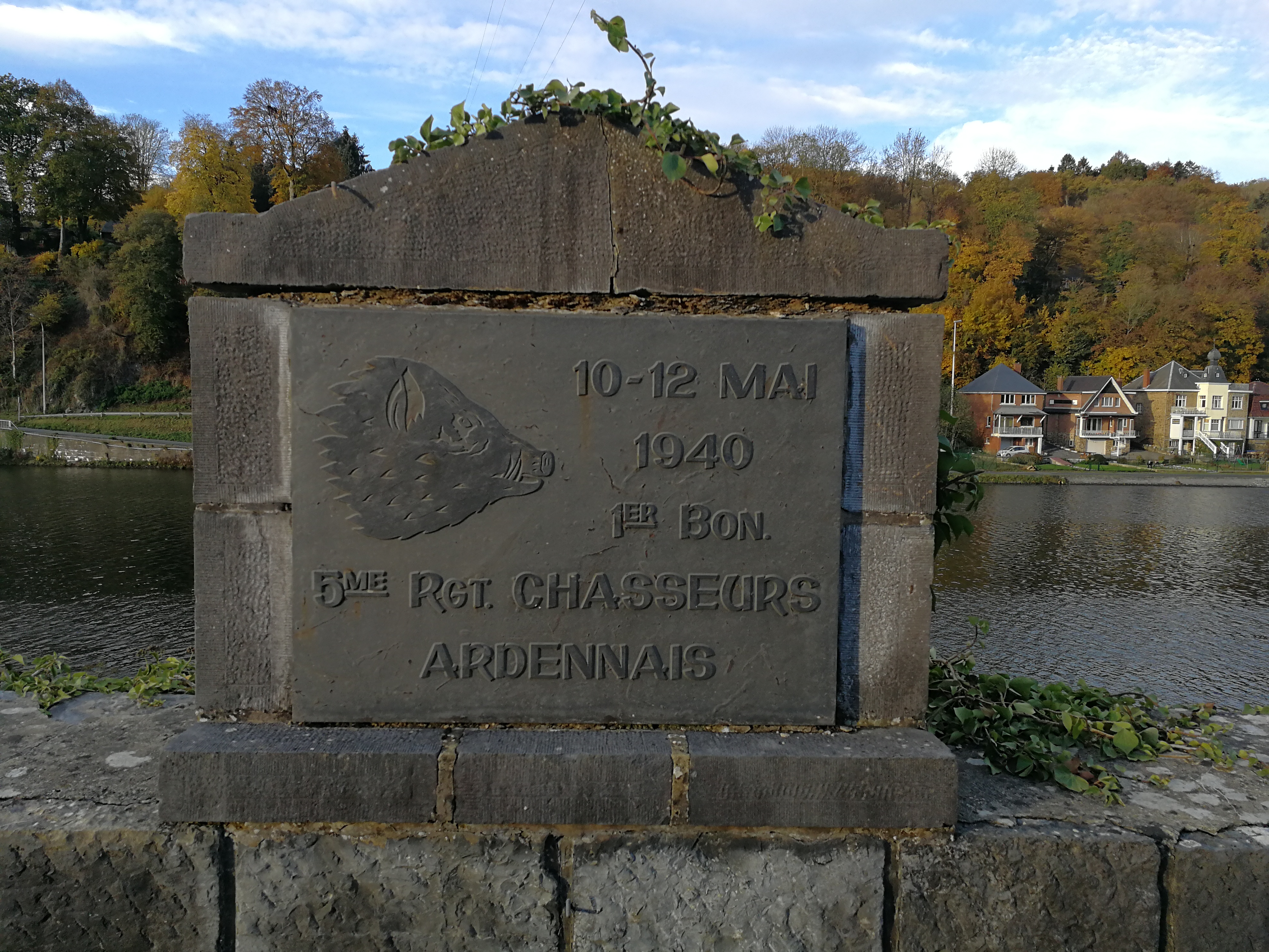 Plaque posée à l'entrée de l'ancien pont d'Yvoir en l'honneur du 1er bataillon, 5e régiment des Chasseurs ardennais. Il est situé rive droite, à l'endroit où un blindé allemand se fit détruire le 12 mai 1940. On y distingue une tête de sanglier, mascotte des Chasseurs ardenais. Sur la plaque, il est écrit: 10-12 mai 1940 1er Bon. 5me Rgt. Chasseurs ardennais This photo of immovable heritage has been taken in the Walloon Region